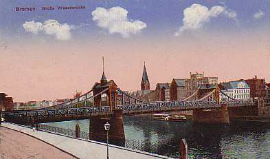 1924 Old images